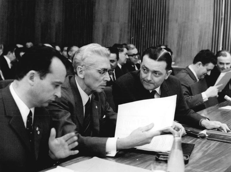 Zentralbild Brüggmann 16.4.1970 Berlin: 24. Sitzung des Staatsrates der DDR - Wissenschaftsorganisation der Chemie und sozialistische Kommunalpolitik auf der Tagesordnung. Weitreichende Beschlüsse für die Gestaltung des entwickelten sozialistischen Gesellschaftssystems mit dem Ökonimischen System als Kernstück fasste der Staatsrat der DDR am 16.4.70 auf seiner 24. Sitzung unter Vorsitz von Walter Ulbricht. - Gesprächsgruppe v.l.n.r. Siegfried Böhm, Herbert Fechner, Scharfenstein, Günter Sieber und Wolfgang Rösser = Fritz siehe auch ADN-Meldg. 22 v. 16.4.70)